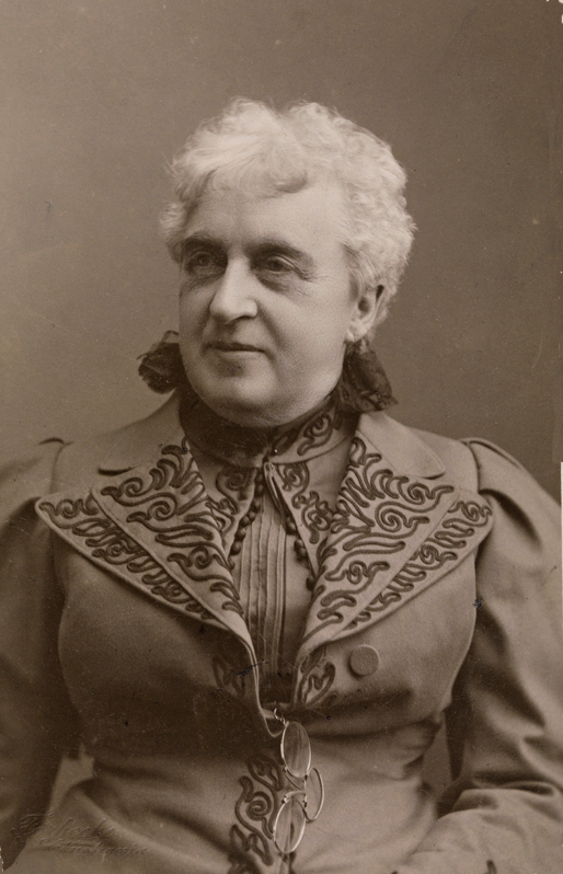 Karoline Reimers Bjørnson. Tittel / Title: Karoline Reimers Bjørnson. Dato / Date: Usikkert ørstall. Fotograf / Photographer: Ludvig Forbech (1865-1942). Eier / Owner Institution: Nasjonalbiblioteket / National Library of Norway Lenke / Link: Bildesignatur / Image Number: no-nb_bldsa_BB0049